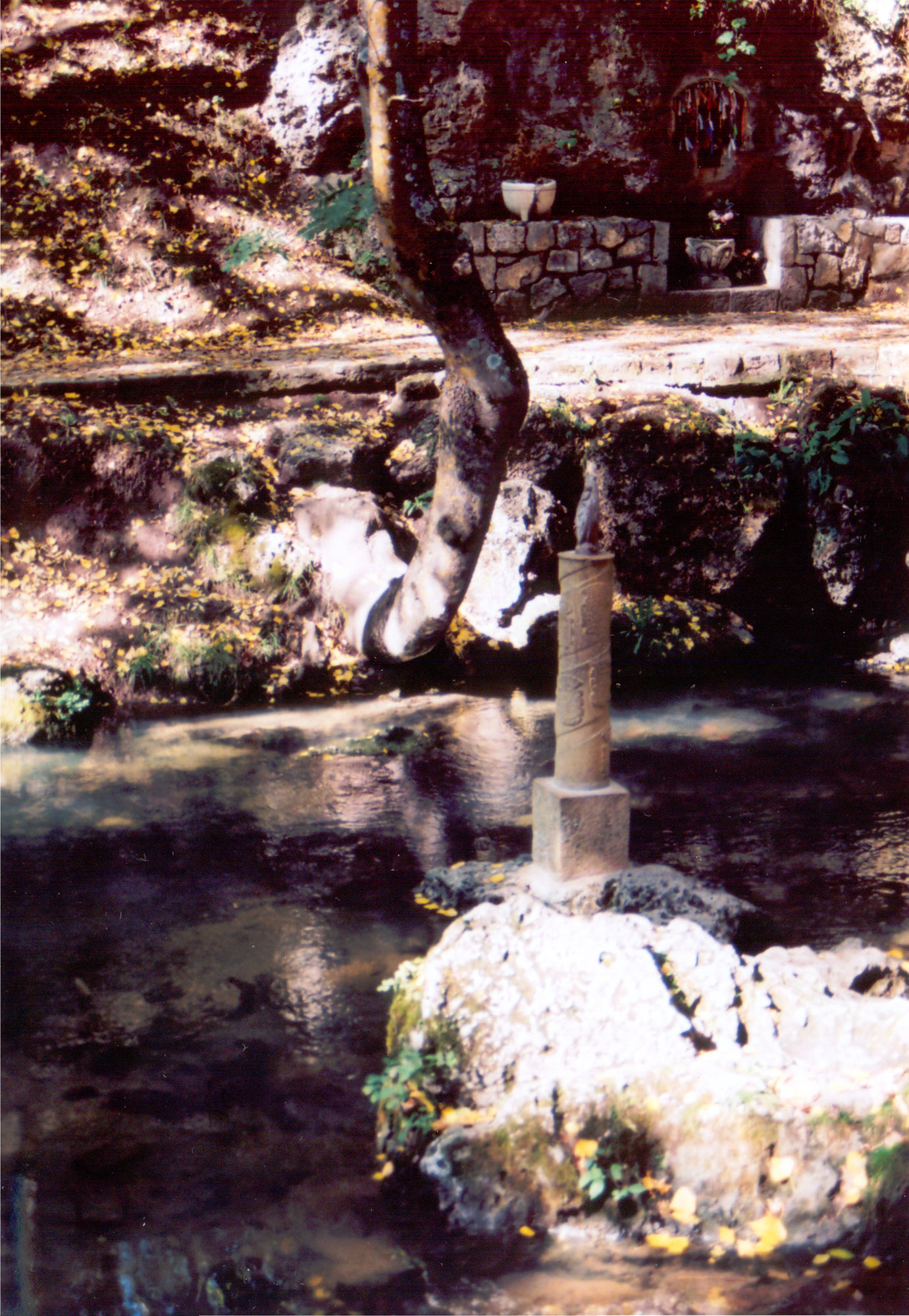 Fontibre, Cantabria, España, fuente del río Ebro. Taken by myself. --Ardo Beltz 13:19, 6 January 2006 (UTC)